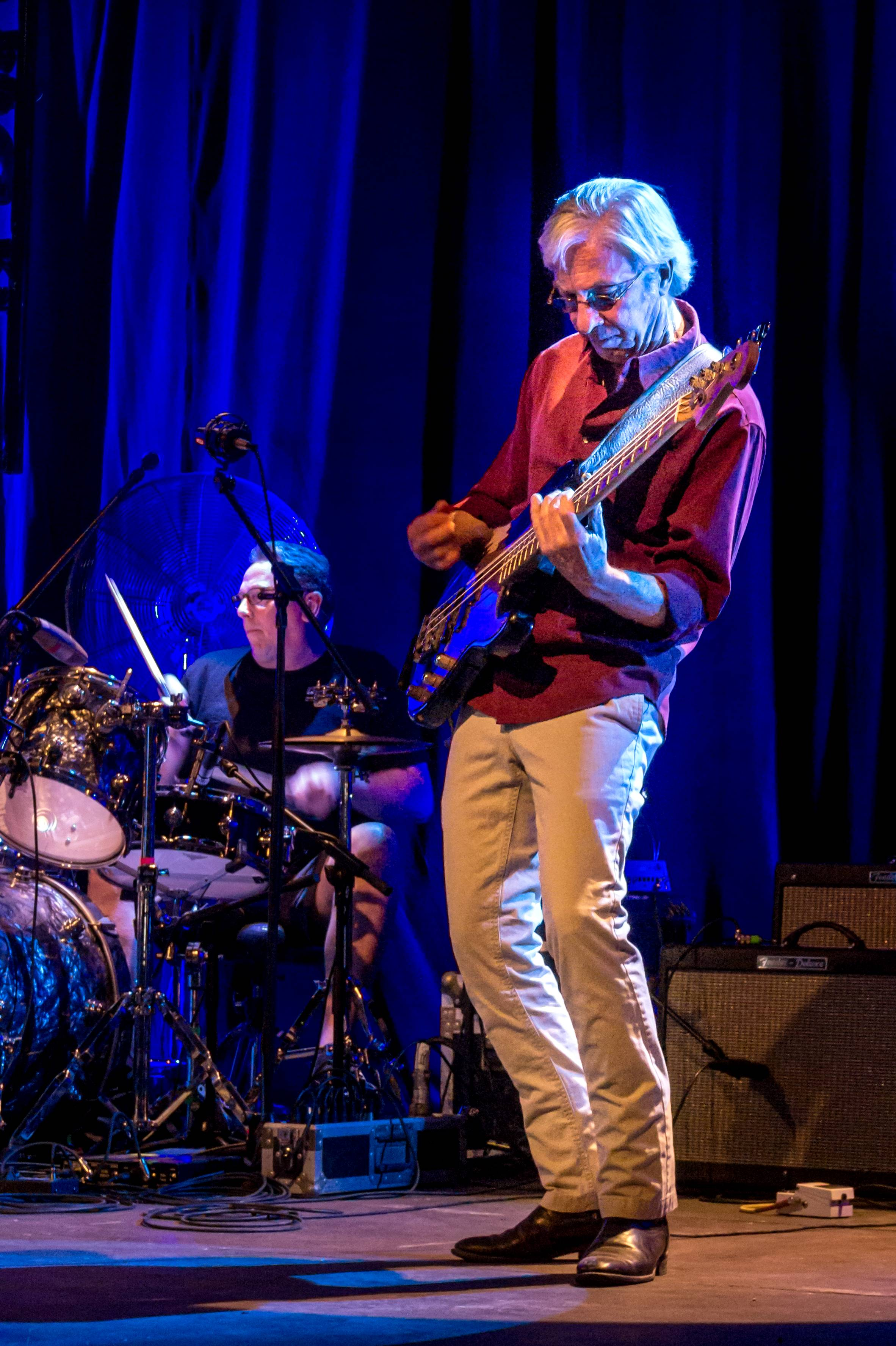 Bilder vom ZMF 2015 John Hiatt & The Combo 09. Juli 2015